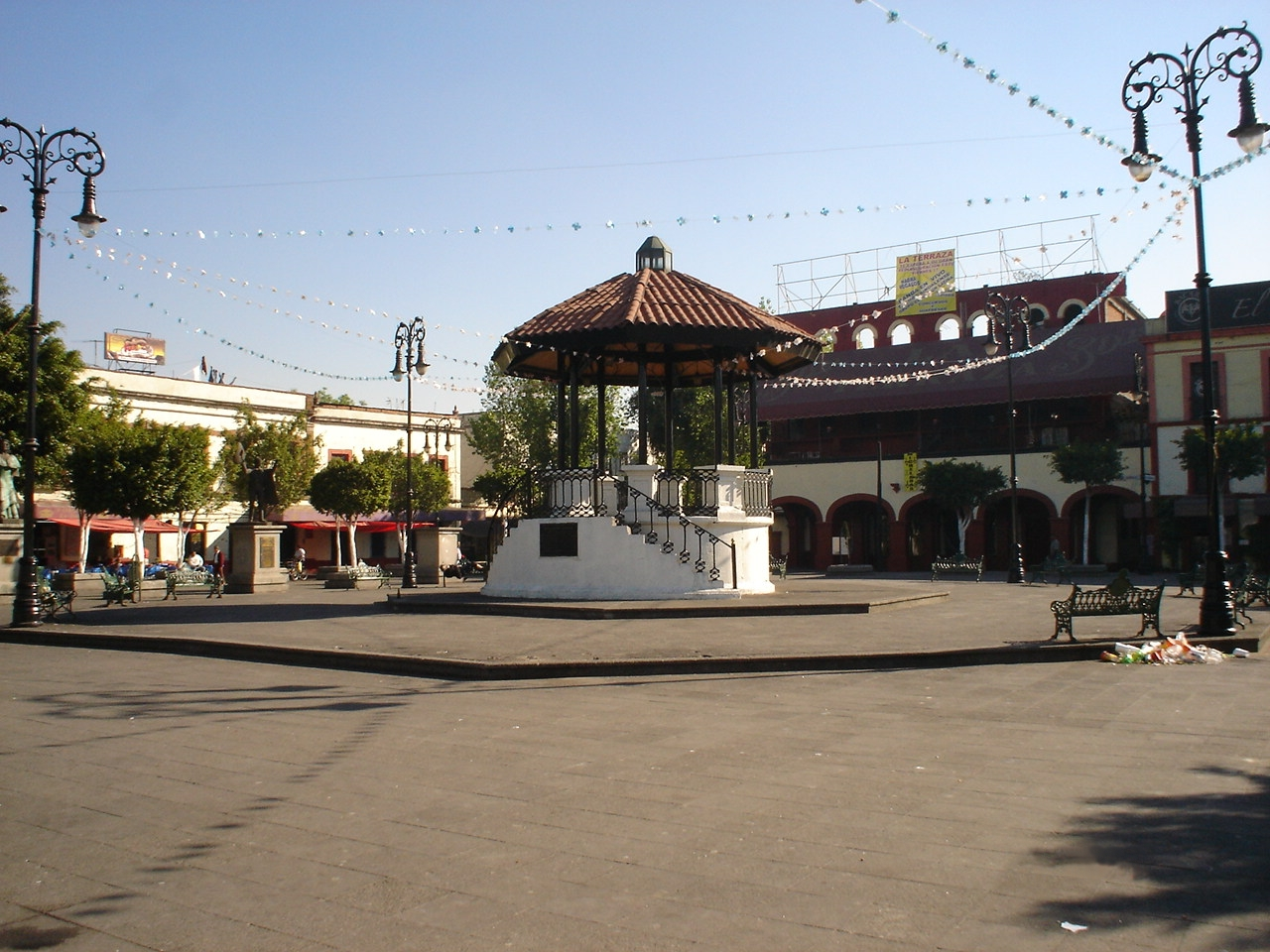 Plaza Garibaldi, sobre el Eje Central Lázaro Cárdenas en la delegación Cuauhtémoc de la Ciudad de México, D.F., México.